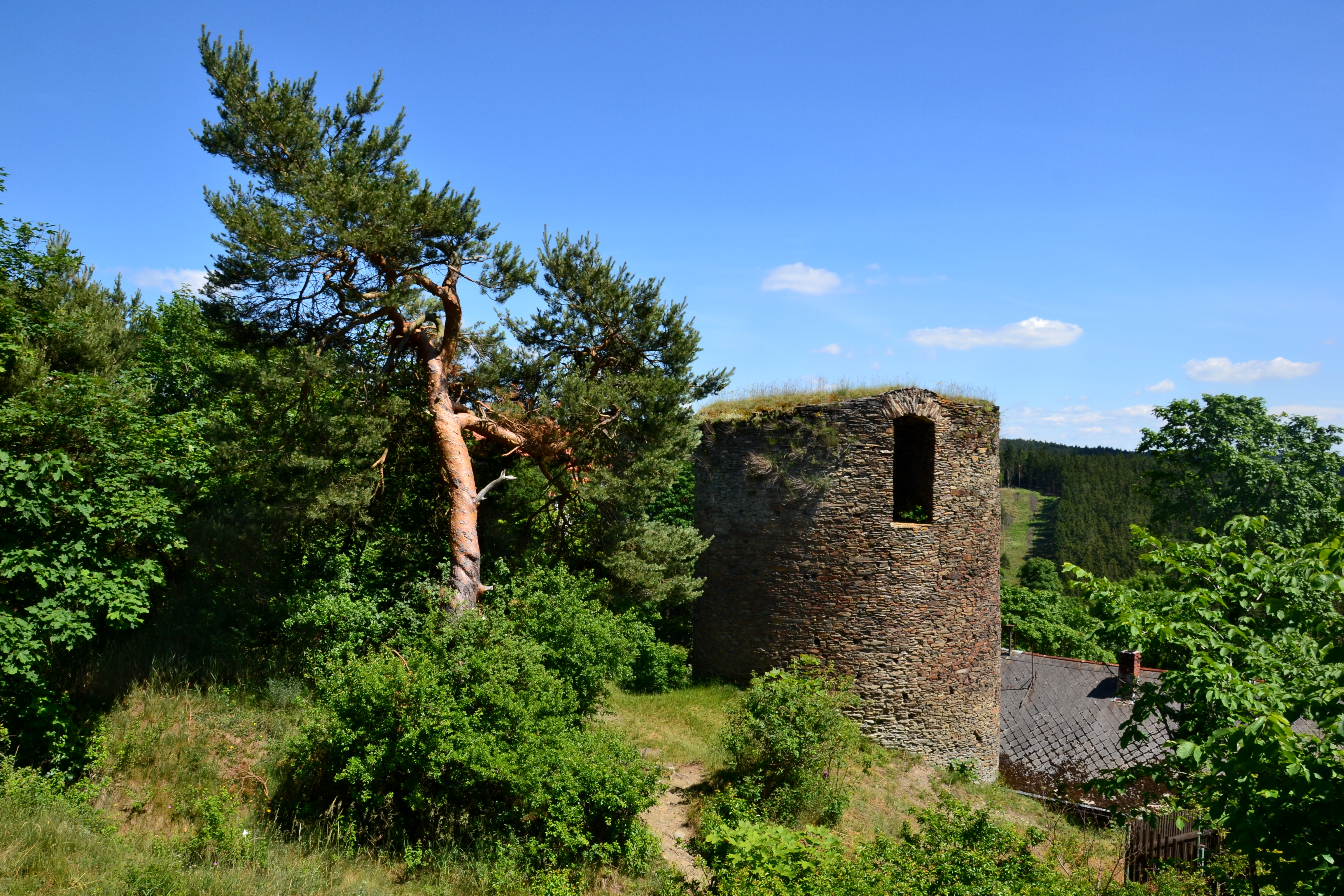 Sychrov – torzo bergfritu